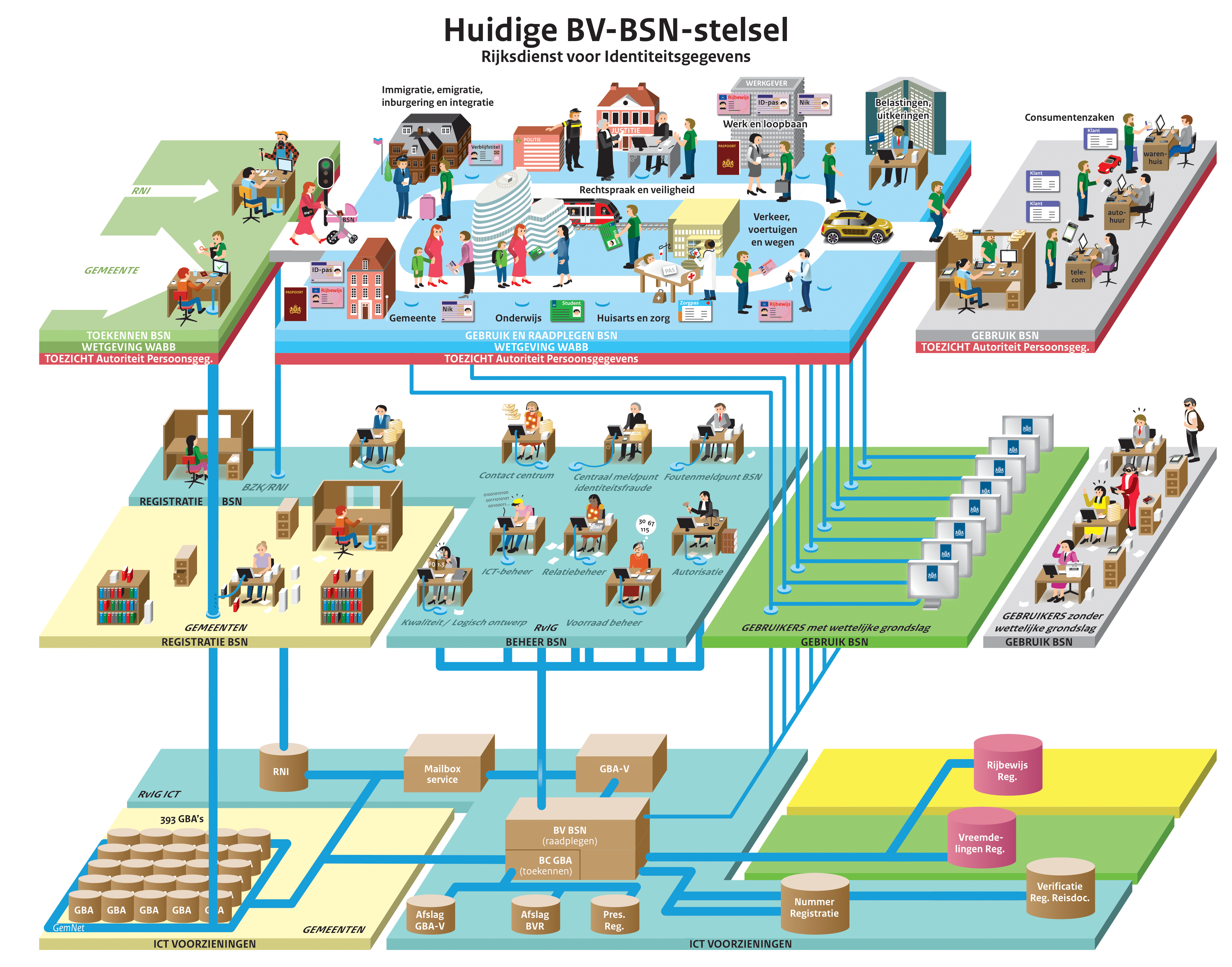 De Stelselplaat BV BSN gevisualiseerd.